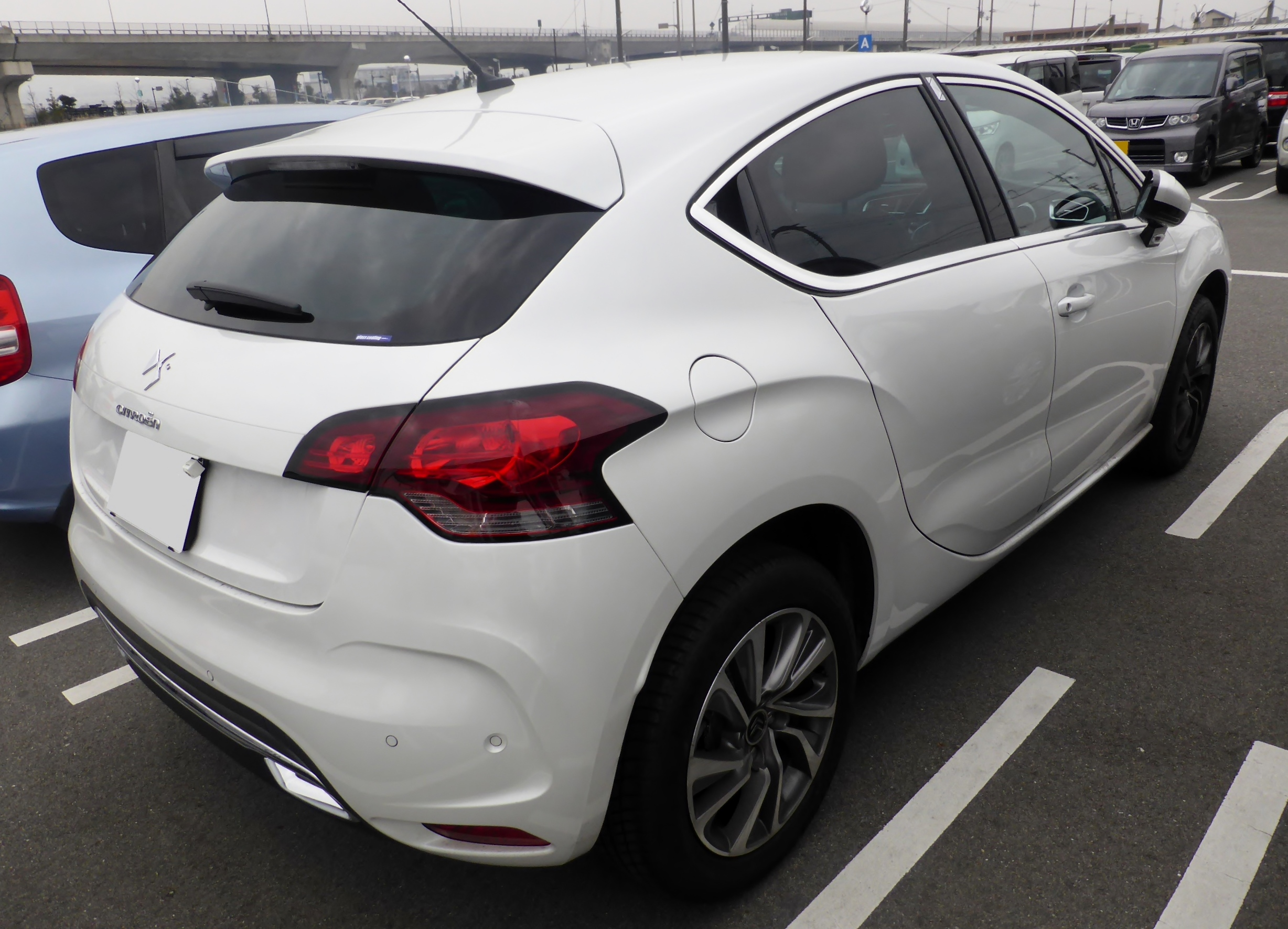 シトロエン・DS4シックをリアから撮影。